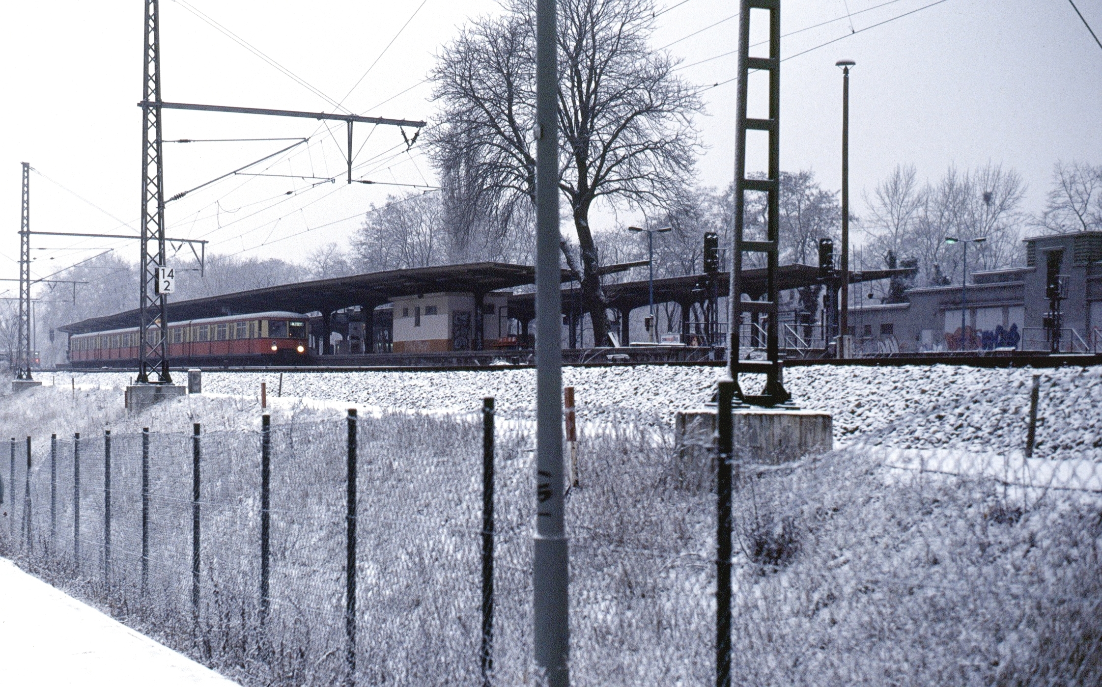 Stanice S-Bahnu Treptower Park v Berlíně v roce 1994